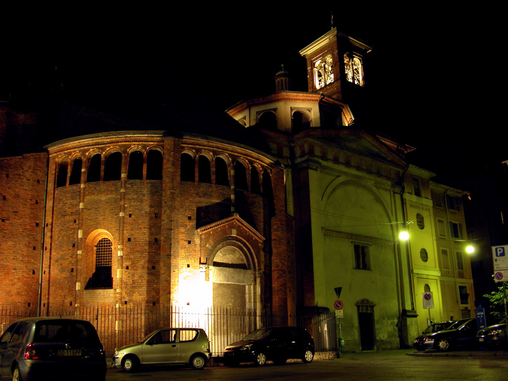 Santi Apostoli e Nazaro Maggiore church in Milano.